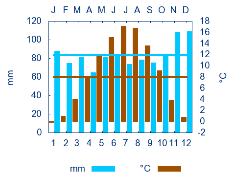 Klimadiagramm